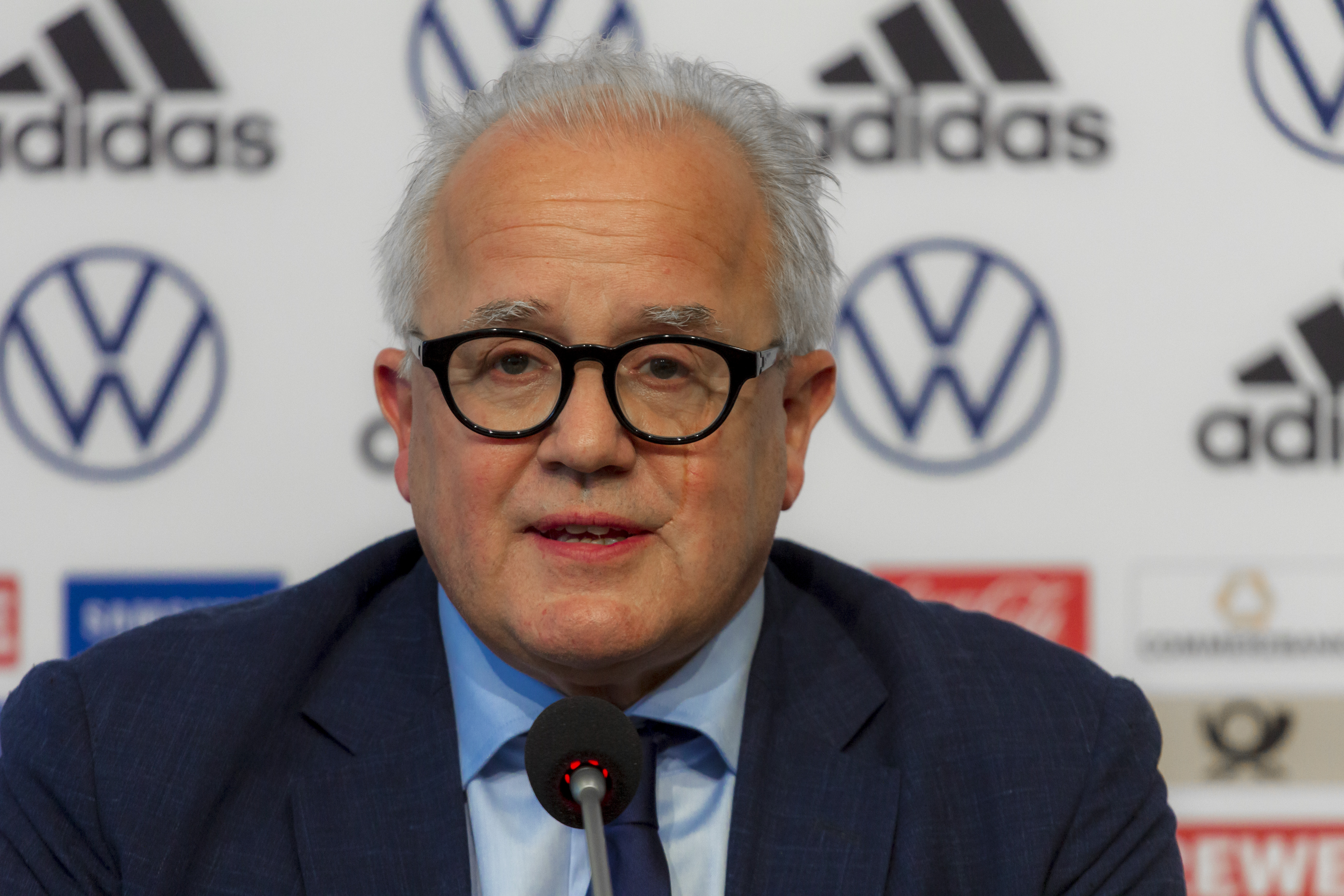 DFB-Präsident Fritz Keller am 27. September 2019 beim DFB Bundestag in Frankfurt am Main.